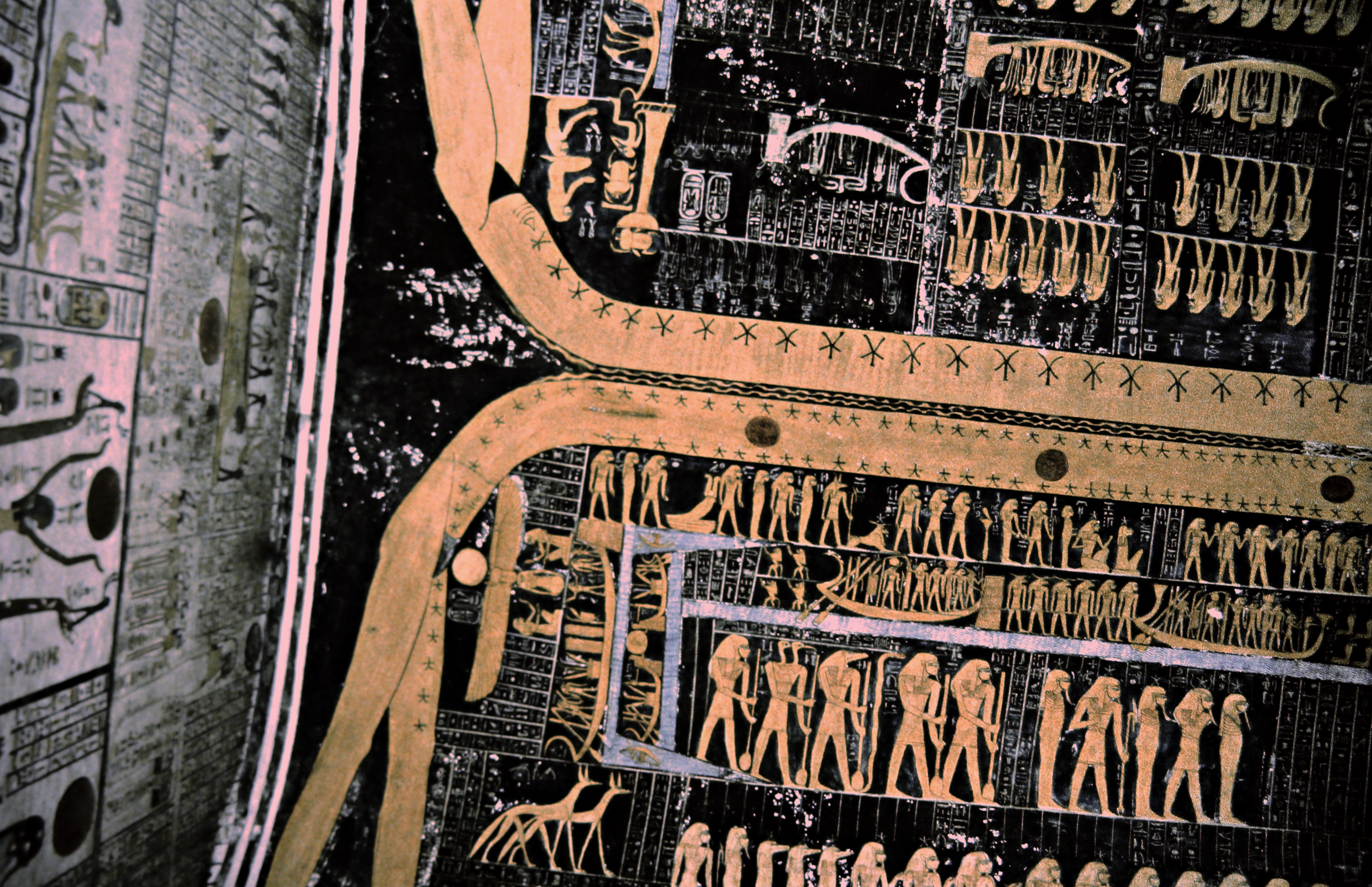 Details der astronomischen Decke im Grabmal KV9